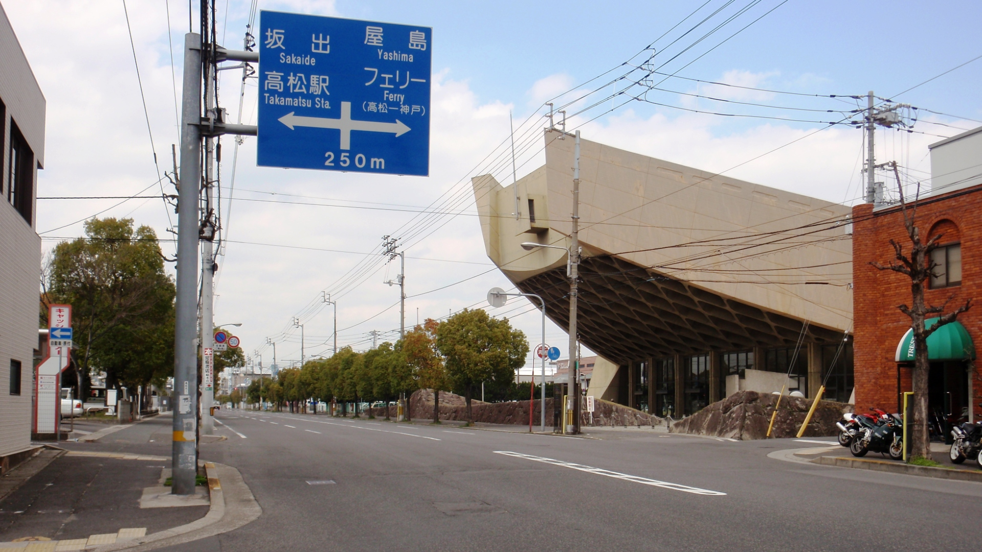 香川県高松市の市道朝日町仏生山線の起点部分から北方向を見る。北方向は臨港道路朝日町本線で、左の青看板奥から横切る路地（市道福岡町2号線）より手前が市道朝日町仏生山線、奥が臨港道路朝日町本線。